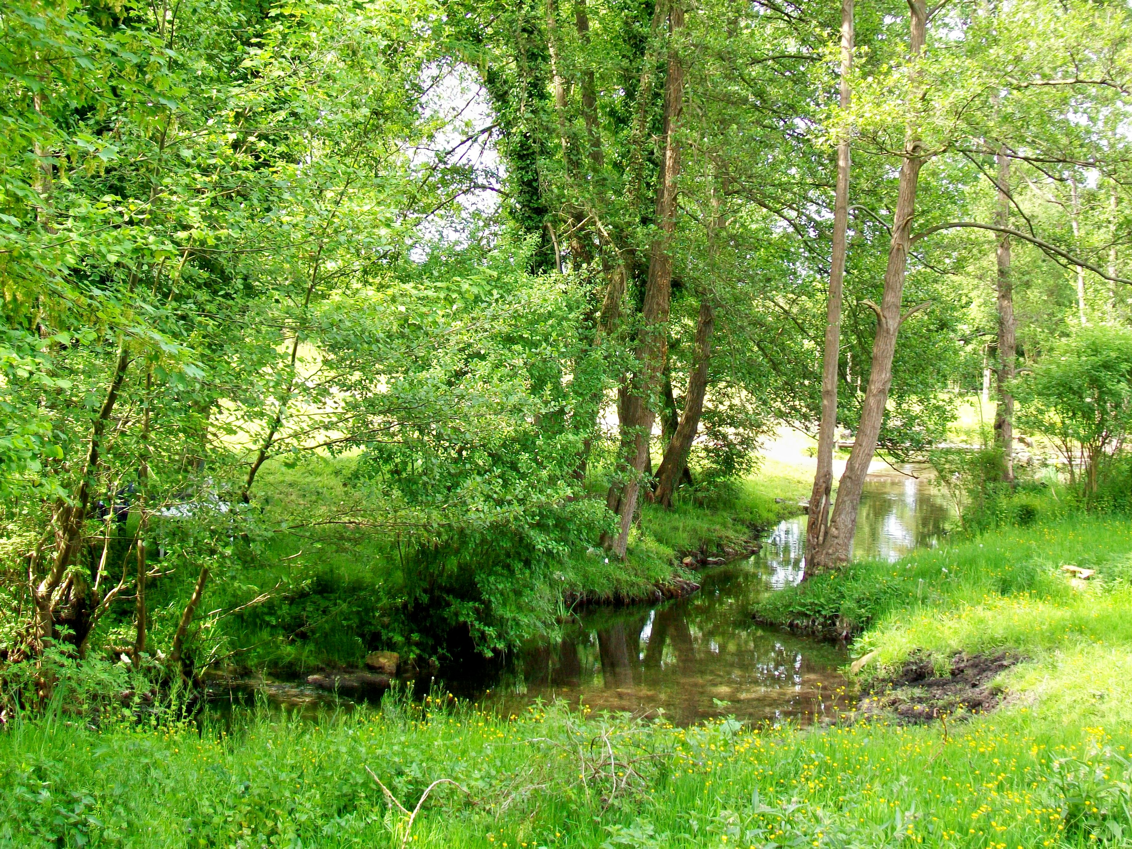 La Thève dans les prairies en aval des étangs de Commelles, sur la commune de Coye-la-Forêt (60).